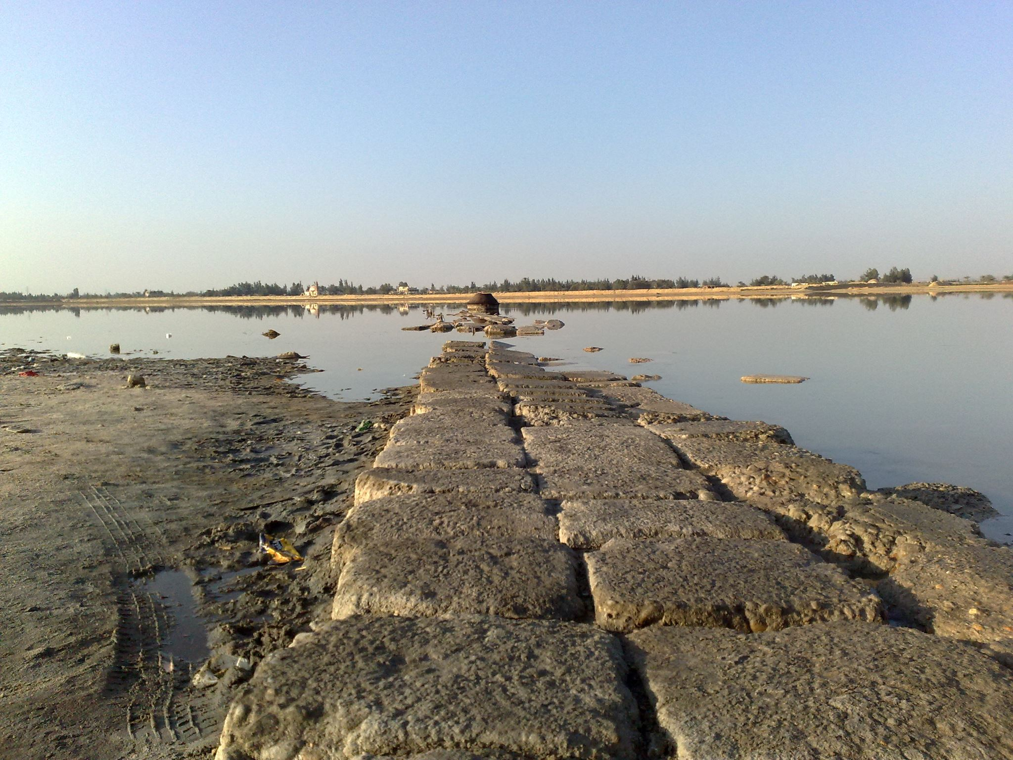 بحيرة نبع الحمراء، وادي النطرون